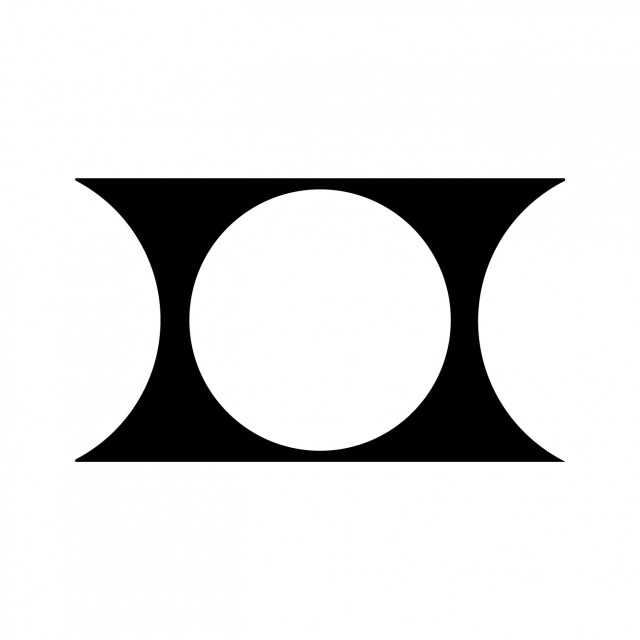 朧月